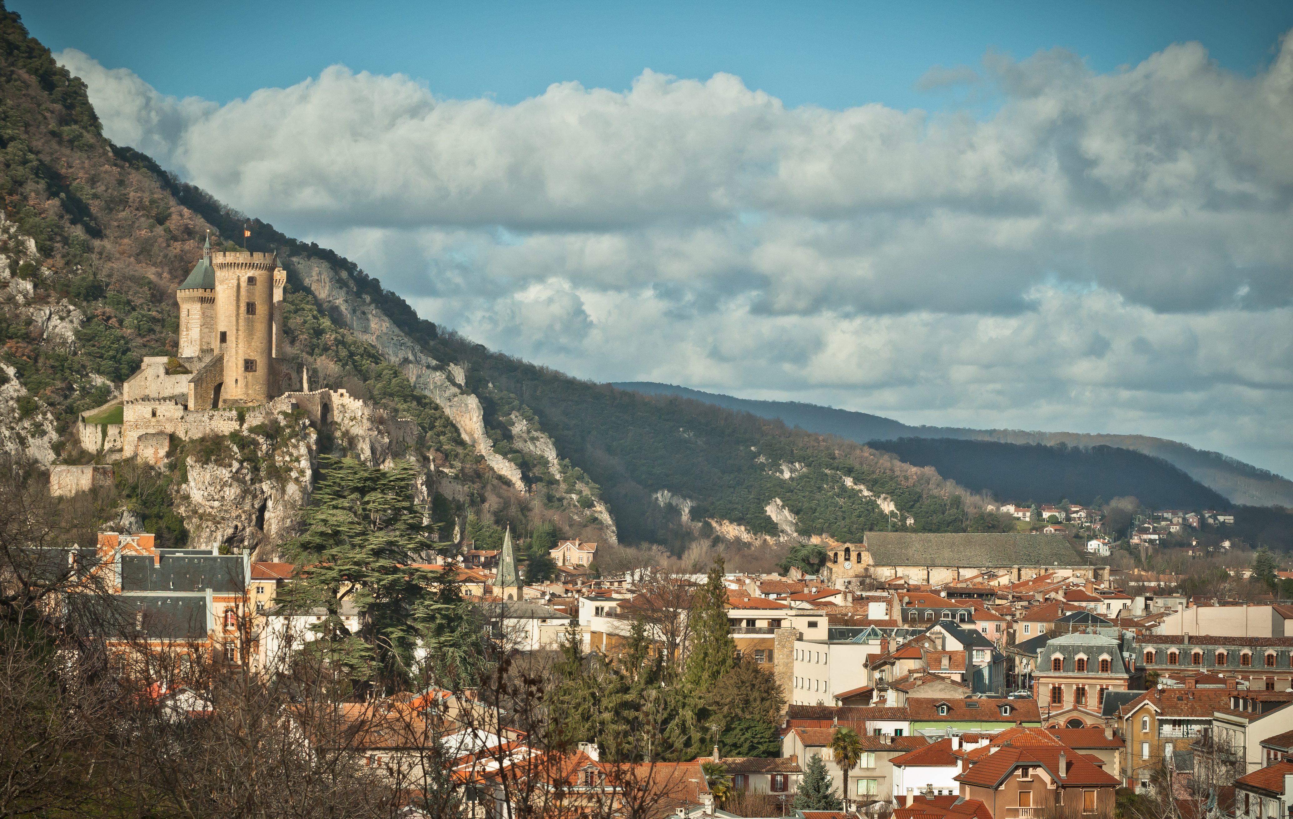 Foix (Ariège, France). Vue à partir de Montgauzy, au dessus de la ville.